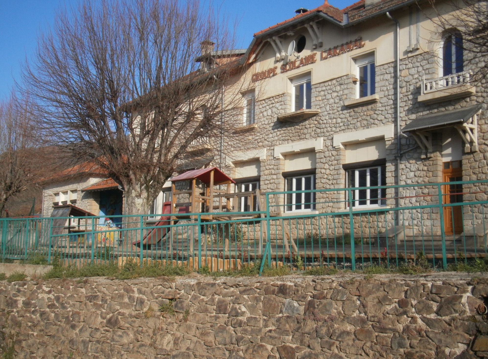 École élémentaire Lakanal à Serres-sur-Arget (Ariège, France).